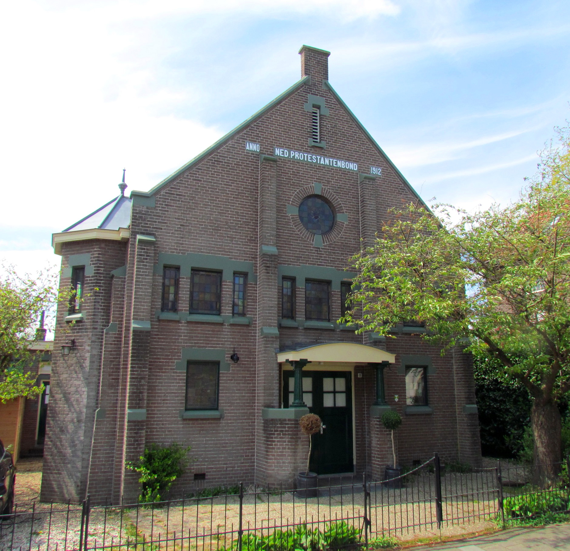 Voormalig kerkje van de Nederlandse Protestantenbond in Dieren